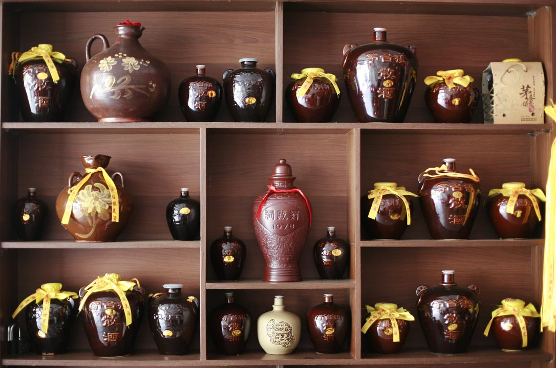 China: Wine